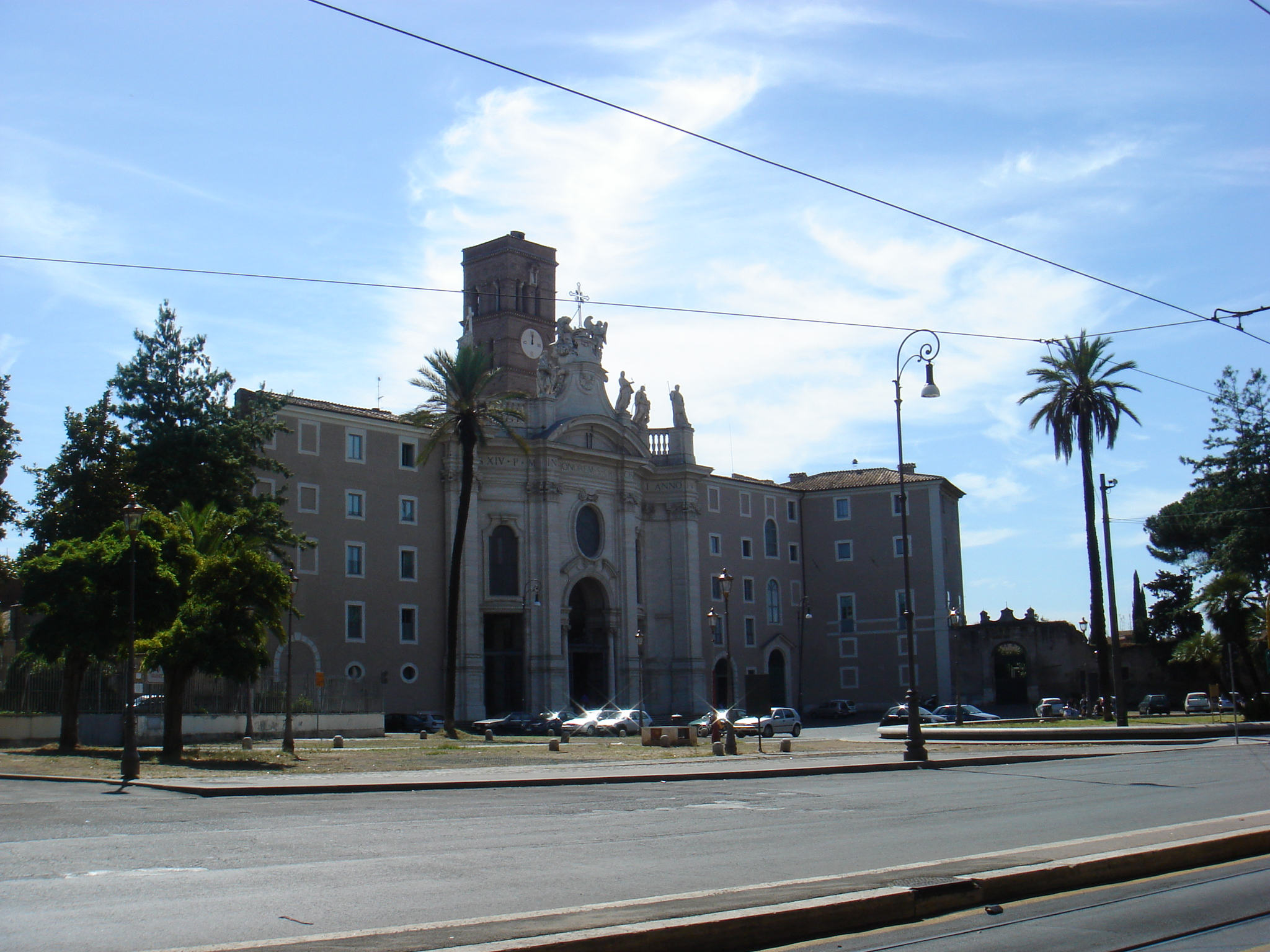 Santa Croce in Gerusalemme, Rome, Italy